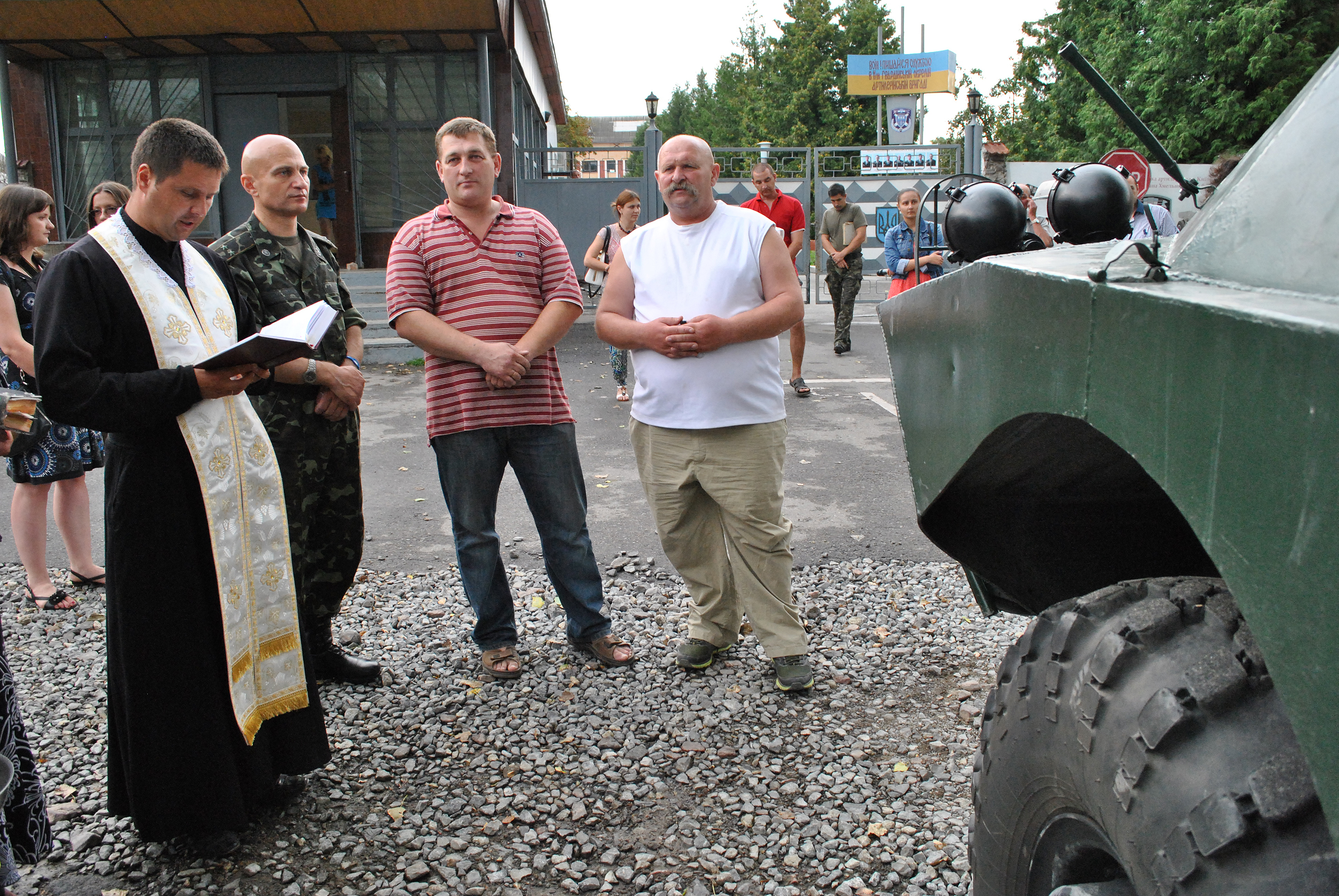 Микулинецькі волонтери передають в. о. Тернопільського військового комісара Андрієві Миськіву для потреб АТО відремонтовану БРДМ-2.